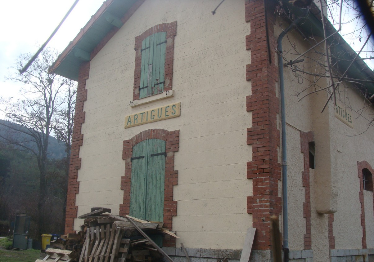 L'ancienne gare d'Artigues, sur la ligne "Central-Var" des Chemins de fer de Provence, aujourd'hui disparue.